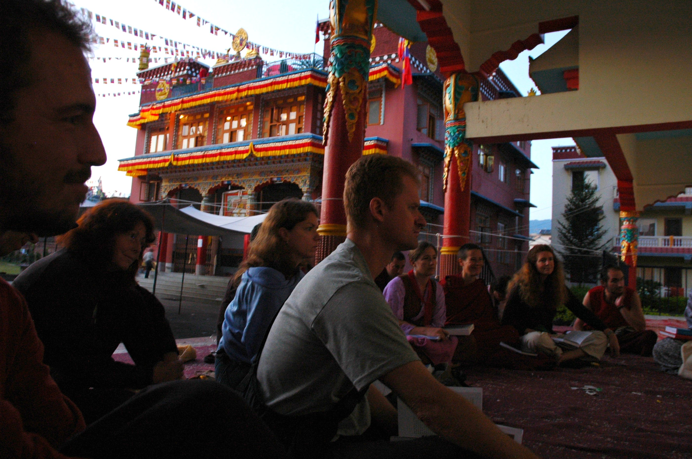 Tharlam Monastery, Kathmandu, Nepal